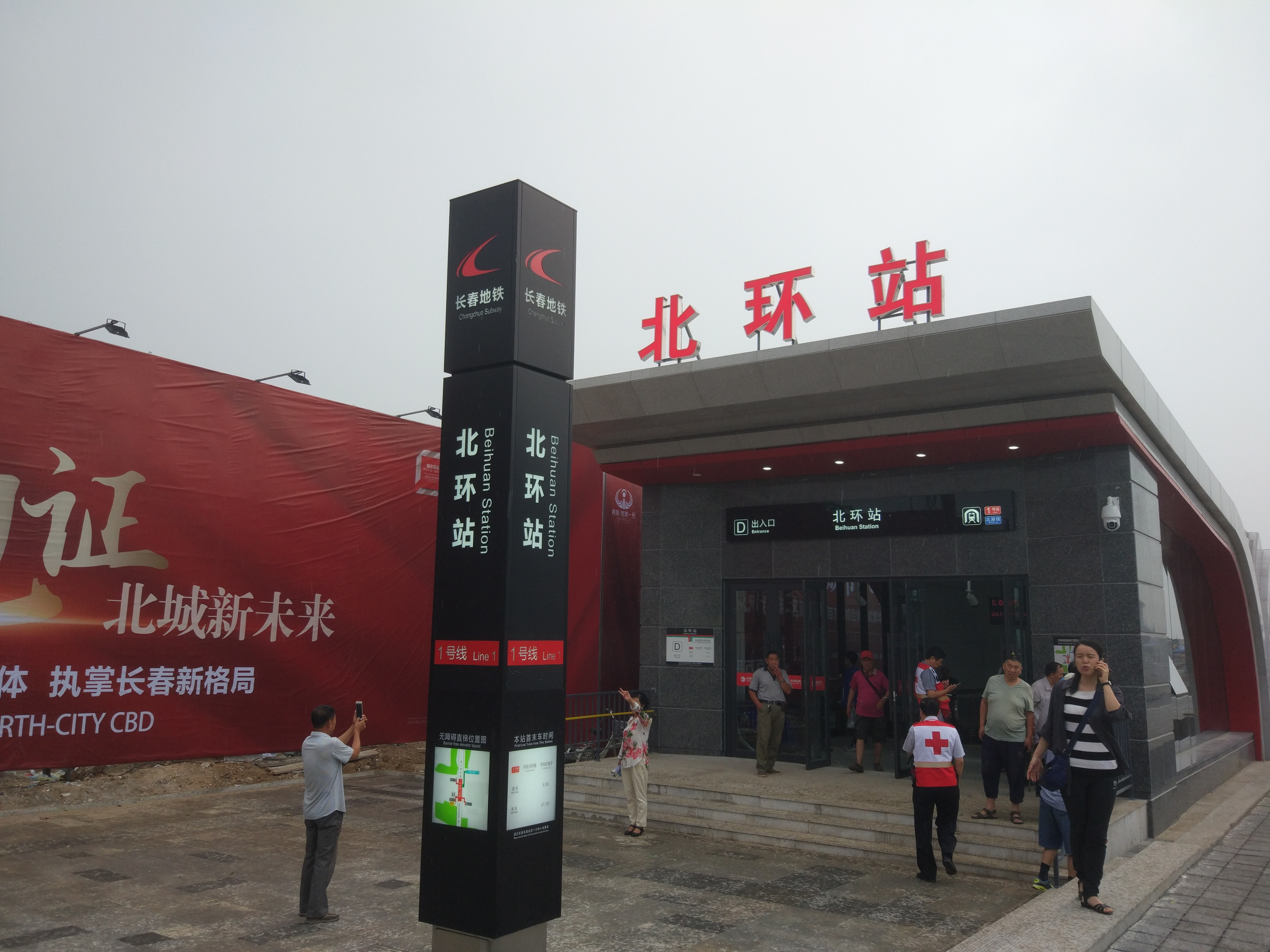 长春地铁北环站出口